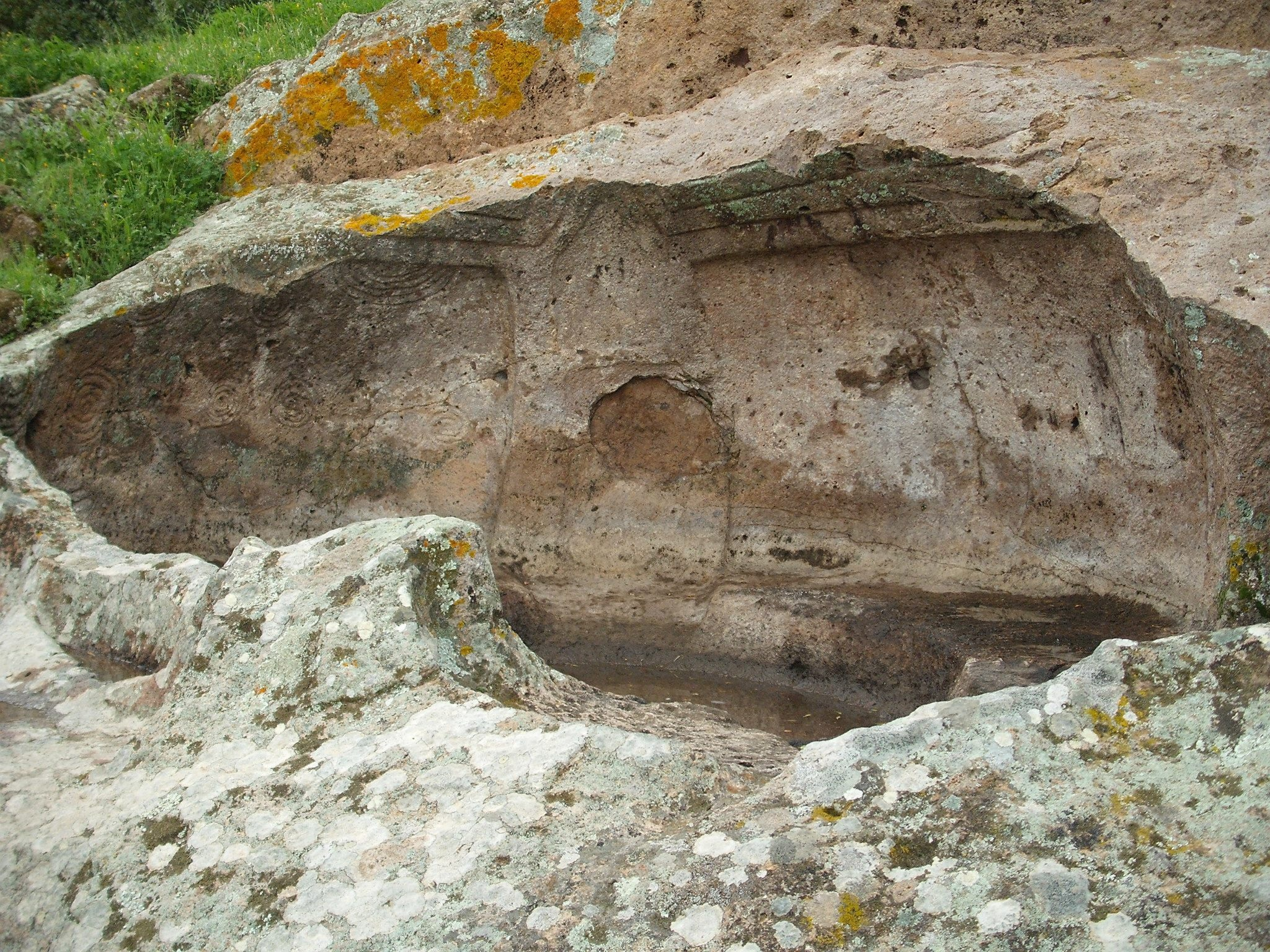 Necropoli di Montessu - MIBAC This is a photo of a monument which is part of cultural heritage of Italy.